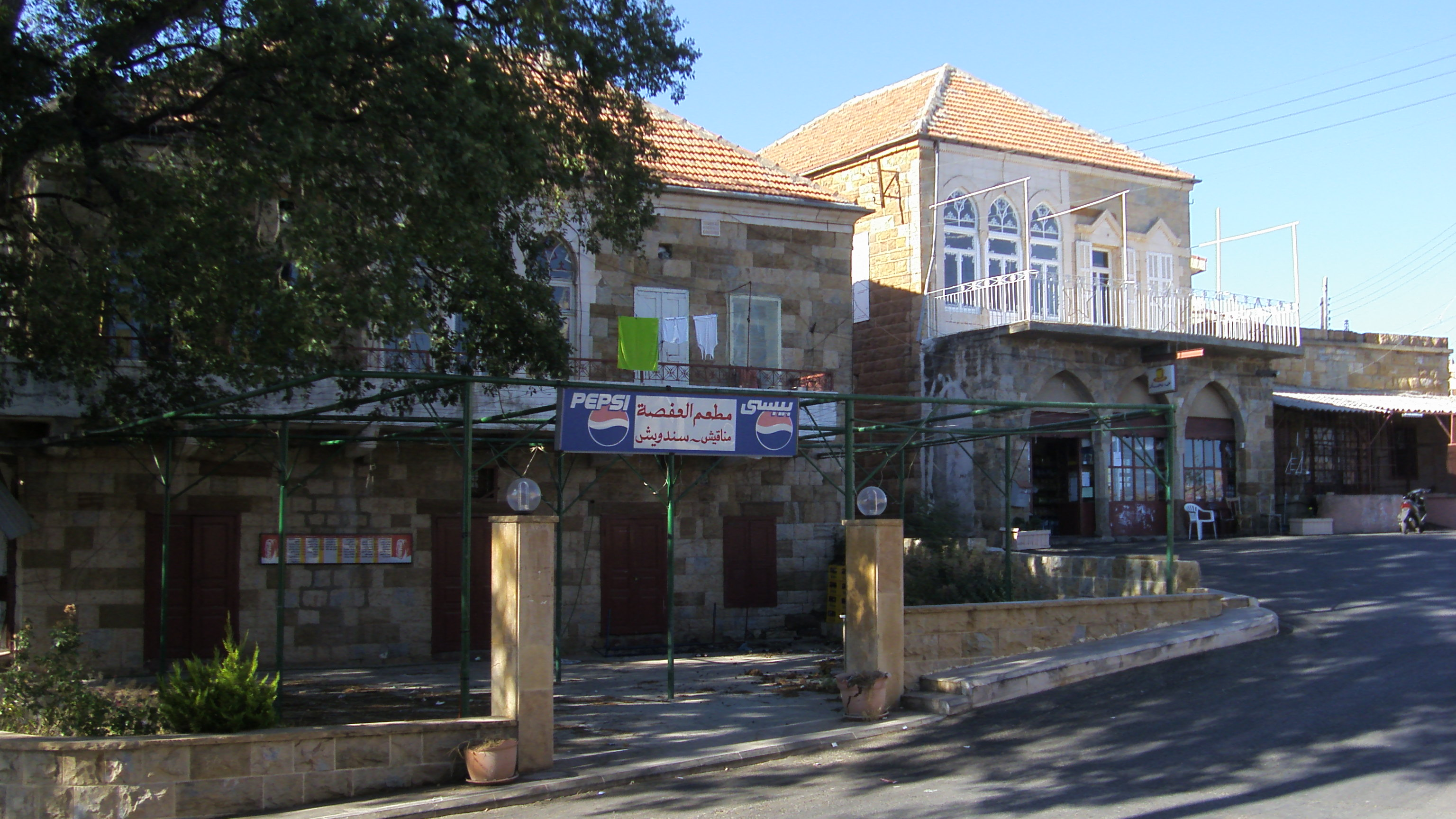 le centre de Hadath El Jebbeh au Liban-Nord